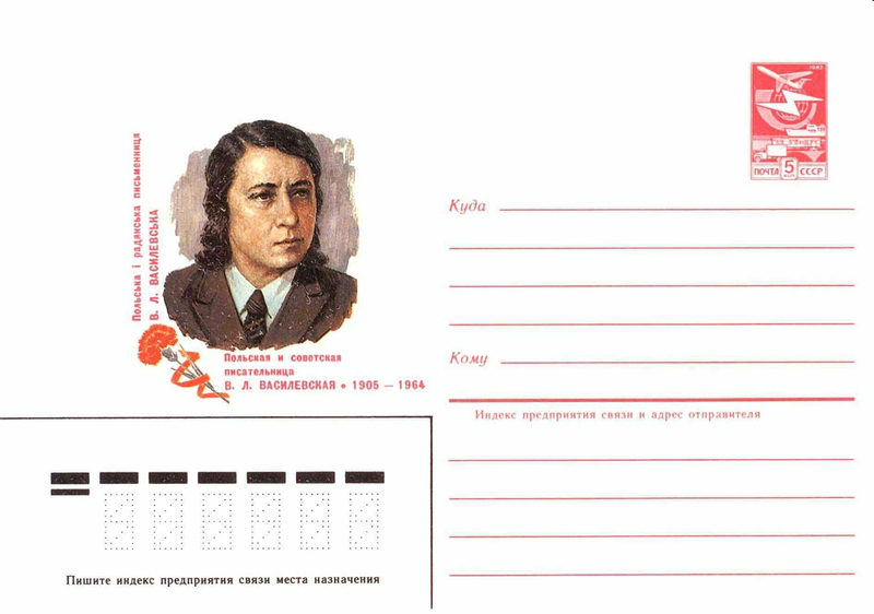 Художественные маркированные конверты 1984 года.